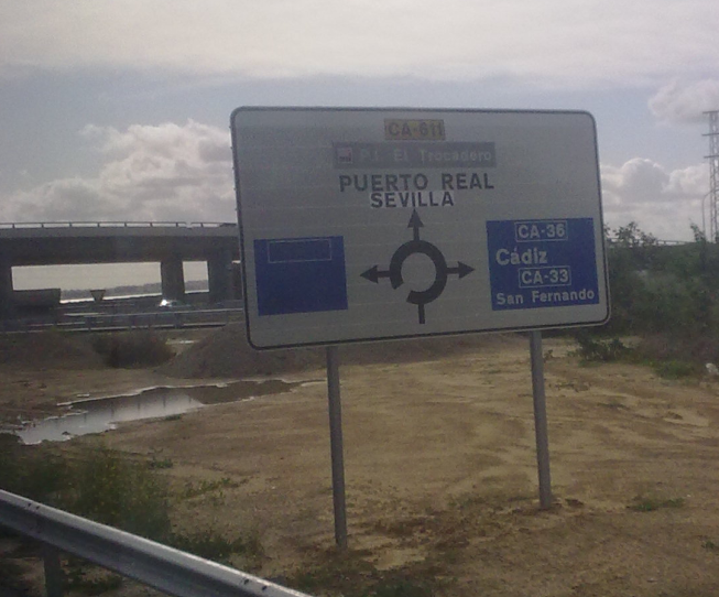 Cartel que indica la CA-36 en Puerto Real